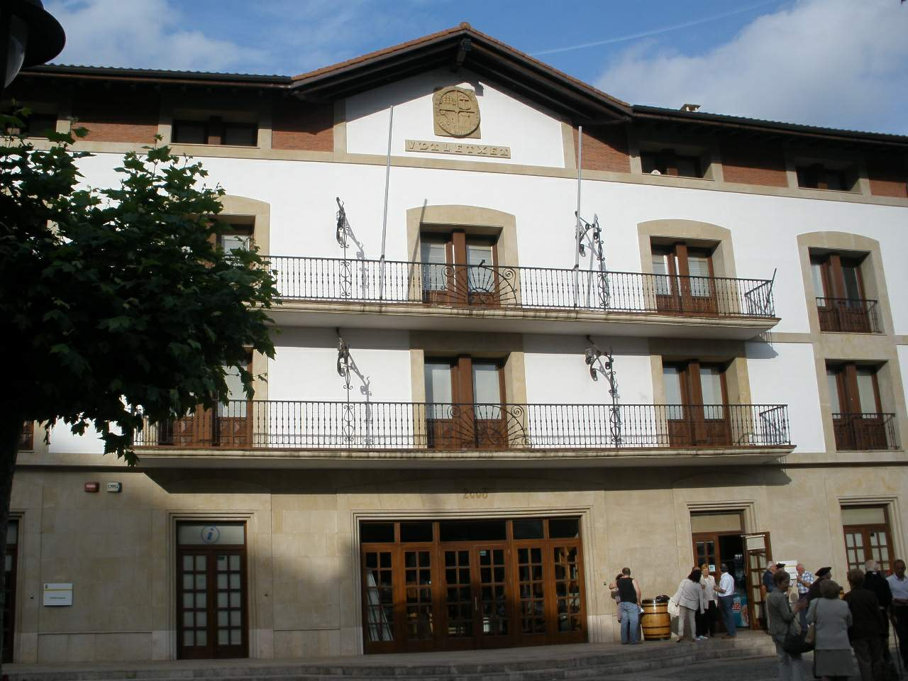 Ayuntamiento de Orio (Gipuzkoa)